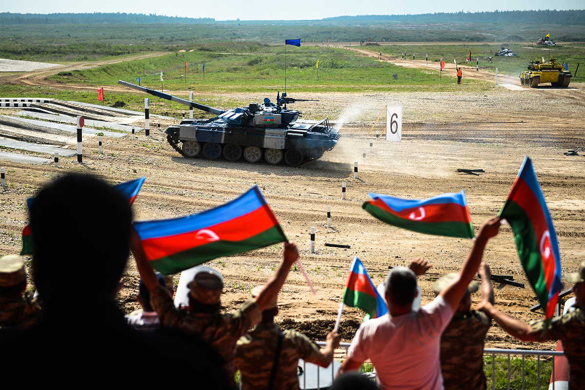 Т-72Б3 обр. 2011. Первые заезды конкурса «Танковый биатлон».